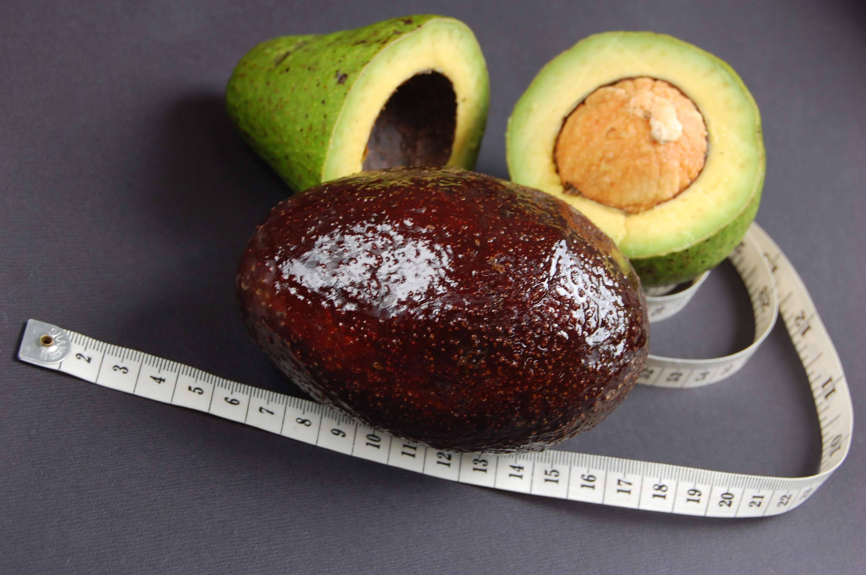 Alpukat (Bahasa Indonesia), Avocado (english)